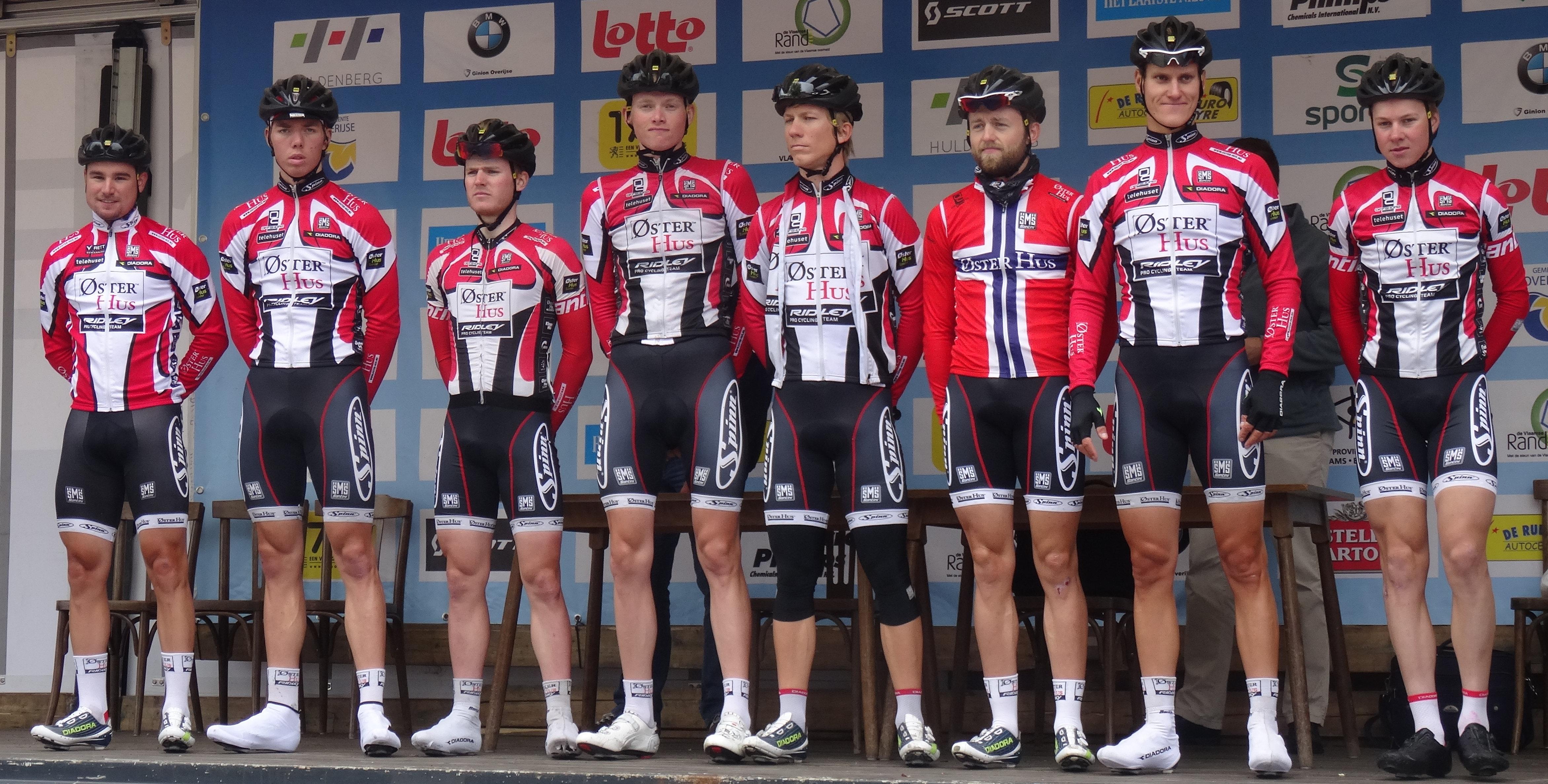 Reportage photographique réalisé le mercredi 27 août à l'occasion du départ de la Druivenkoers Overijse 2014 à Huldenberg, Belgique.